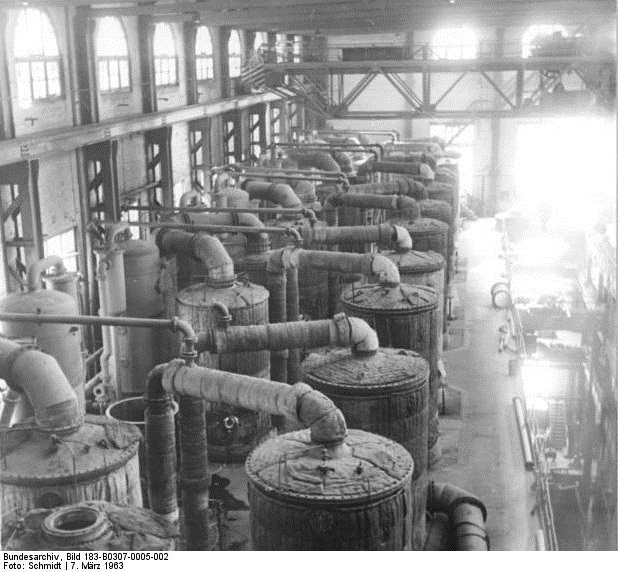 Zentralbild-Schmidt We-Schä 7.3.1963 Leunawerke sichern Düngemittelproduktion Termingerecht und in der planmäßigen Menge ist die Düngemittelproduktion für unsere Landwirtschaftsbetriebe in den Leuna-Werken gesichert. Auch in diesem Jahr werden von dem größten Düngemittelproduzenten der DDR ca. 900 000 Tonnen Ammonsulfat hergestellt. UBz.: Übersicht über einen Teil der Ammonsulfat-Eindampferei. Information added by Wikimedia users.